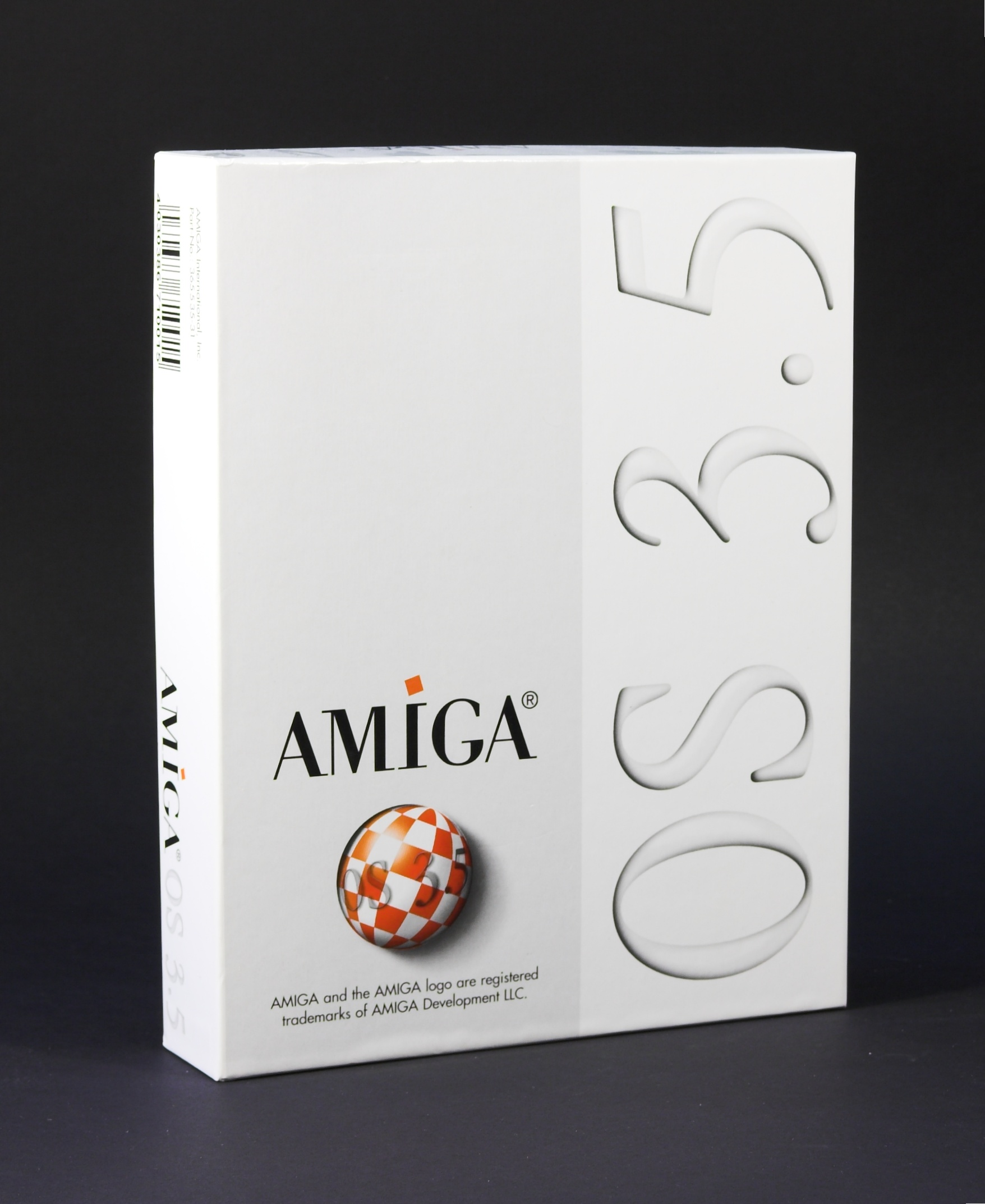 AmigaOS 3.5 Box